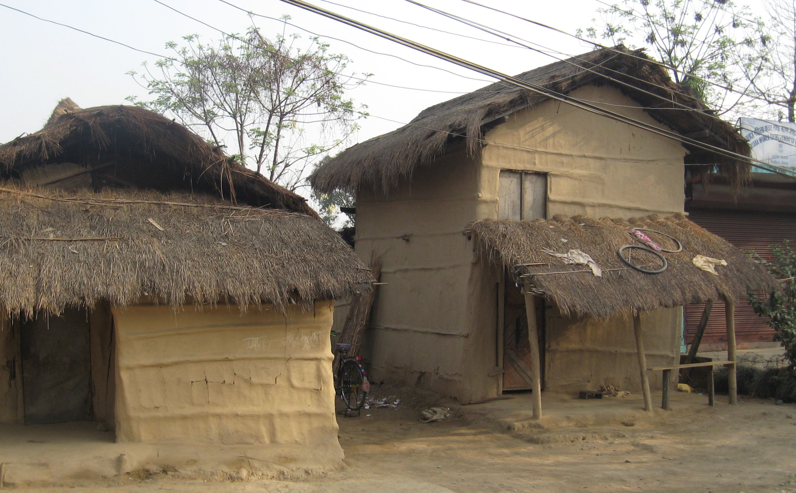 Sauraha